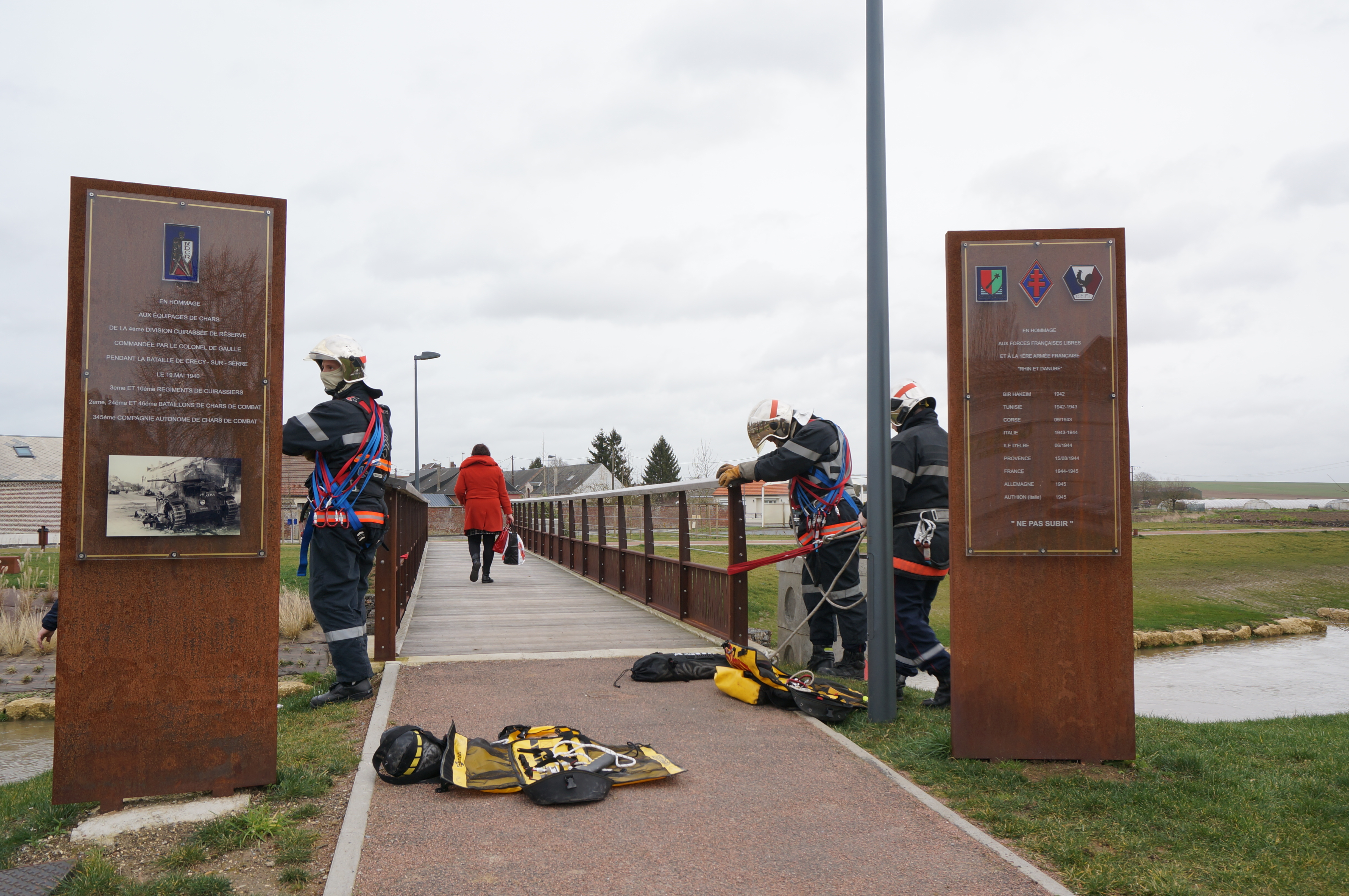 Passerelle à Crécy-sur-Serre, Aisne, avec hommage aux combats de cuirassés du 19 mai 1940, commandés par le colonel Charles De Gaulle, à la première armée française et aux forces françaises libres (FFL).